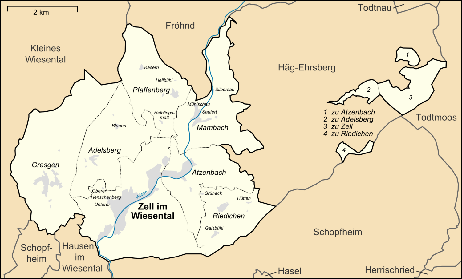 Karte der Ortsteile und Nachbargemeinden der Gemeinde Zell im Wiesental